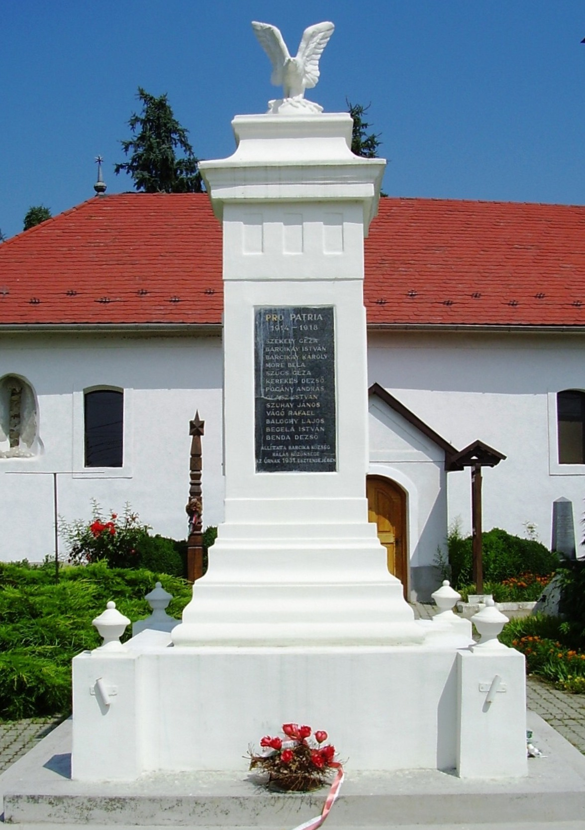 First world war monument in Kazincbarcika